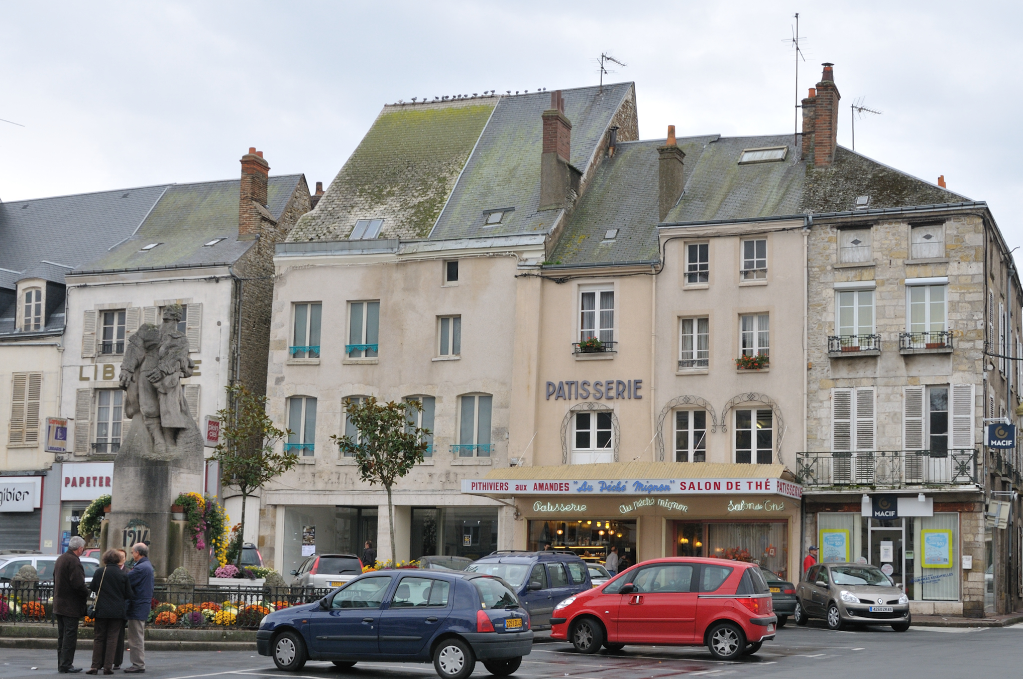 Place du Martroi, Pithiviers, Loiret, France